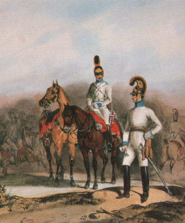 k.k. ö.-u. Dragoner Mitte des 19.Jahrhunderts